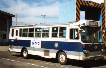 JRバス臼三線の車両